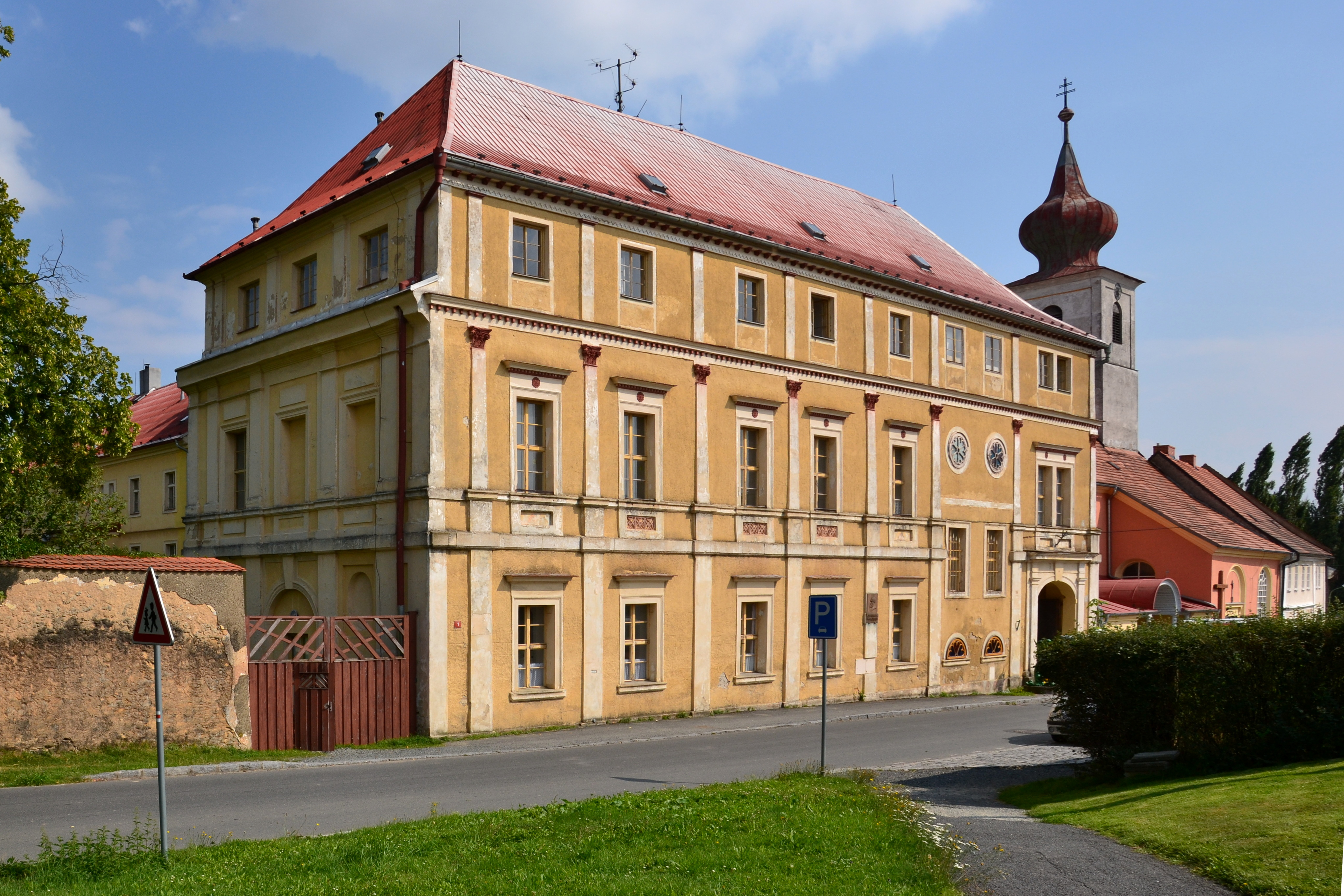 Zámek Trhanov, Trhanov 1, Trhanov.